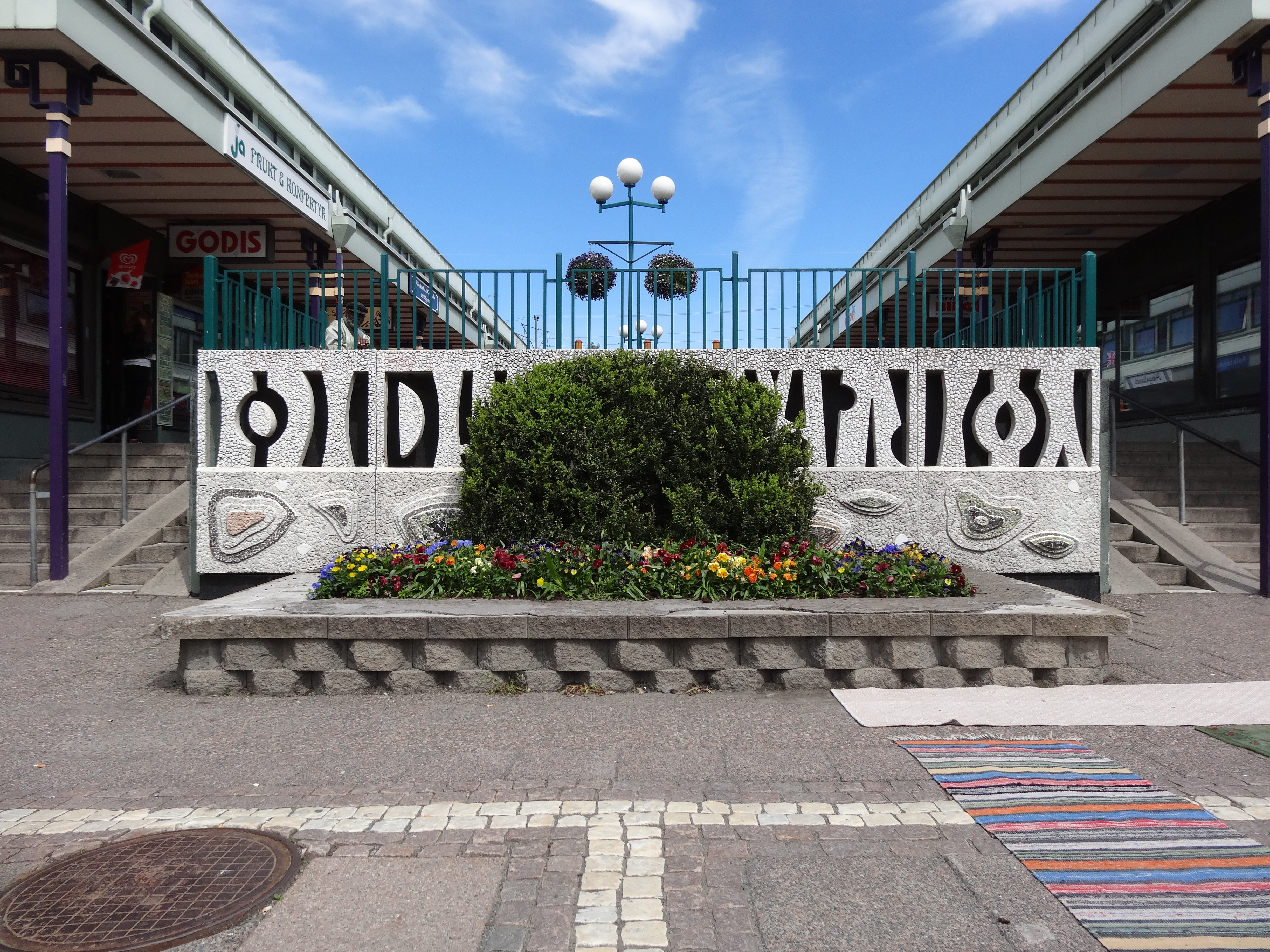 Stenar och vatten, Bengt Blomquist, 1963. Vårväderstorget, Göteborg.